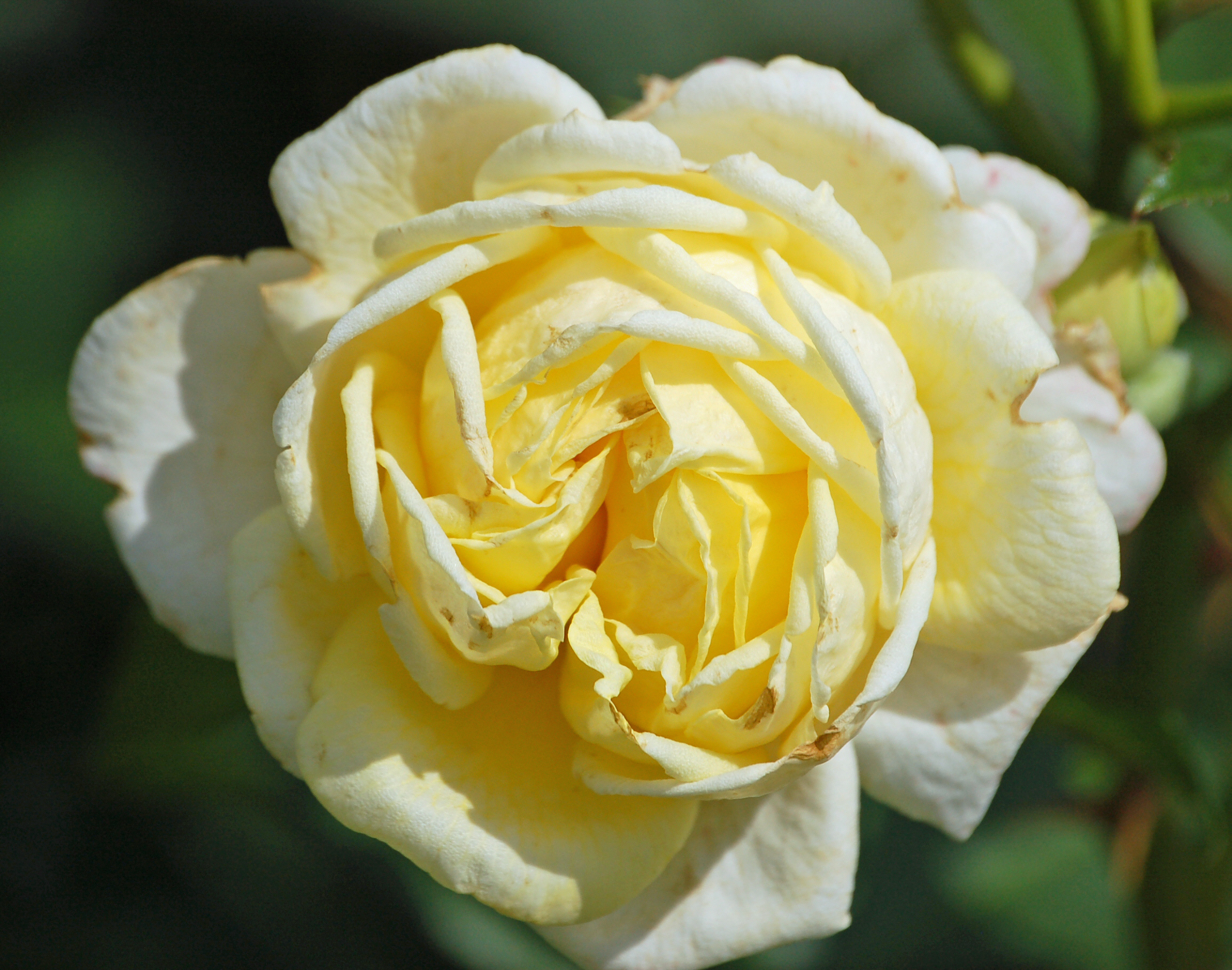 Beetrose Karl-Polberger-Rose (Kordes 2007).